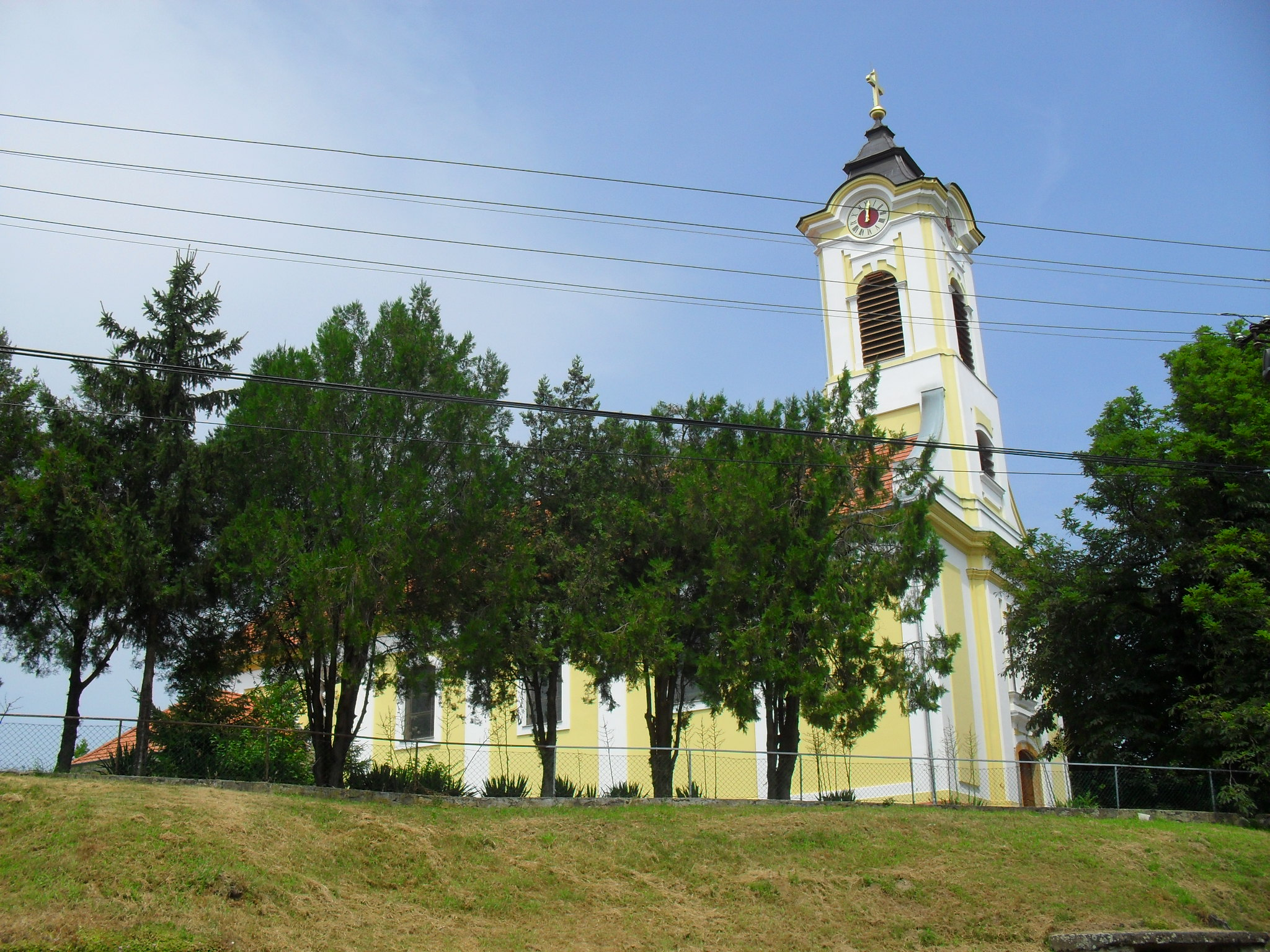 Patak - Szentháromság római katolikus templom